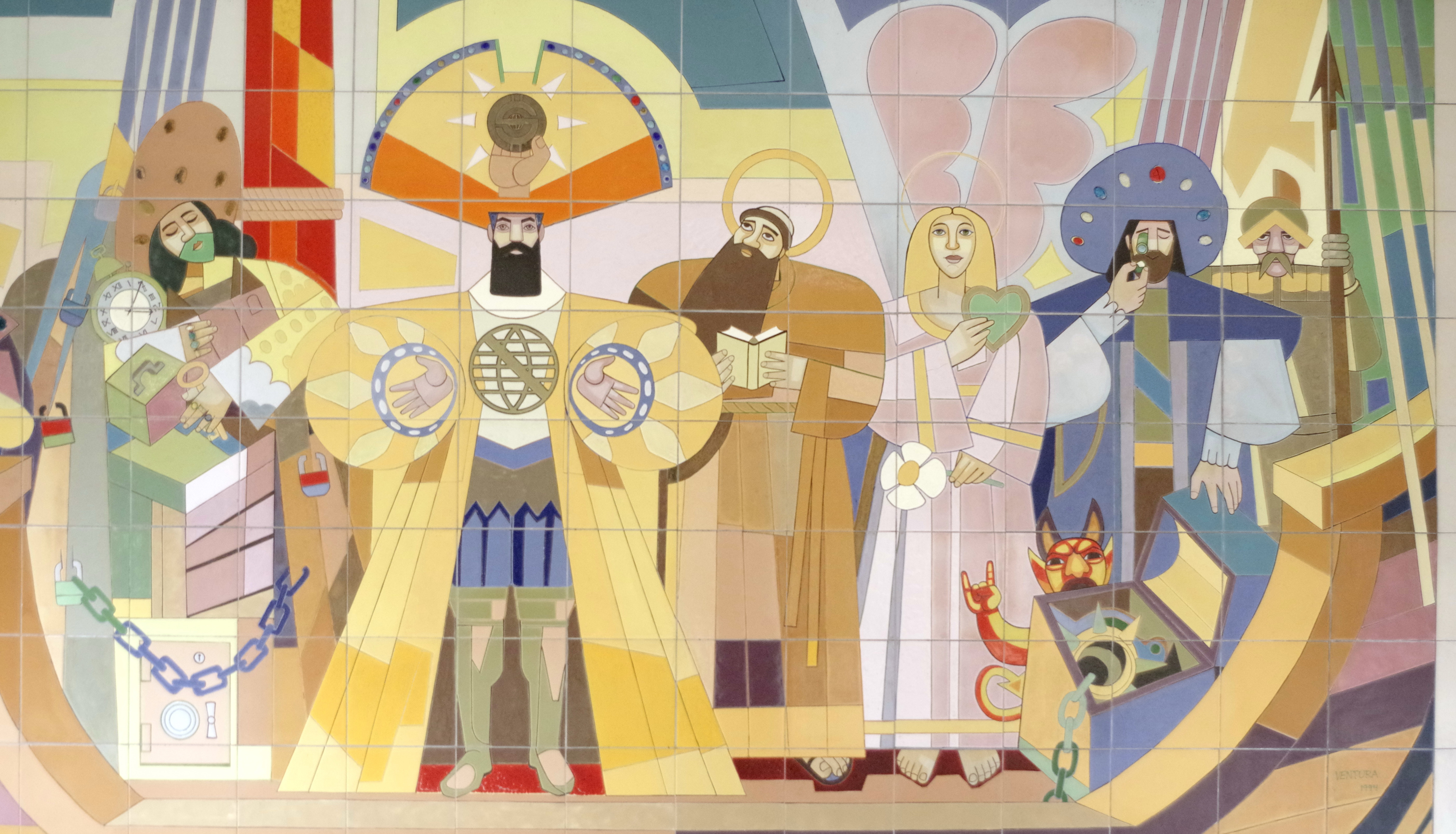 16.4.14 Lisbon 02